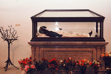 Tombeau de Sainte-Roseline, Chapelle Sainte-Roseline, Les Arcs